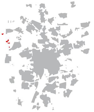 Lage des Braunschweiger Stadtteils FAL